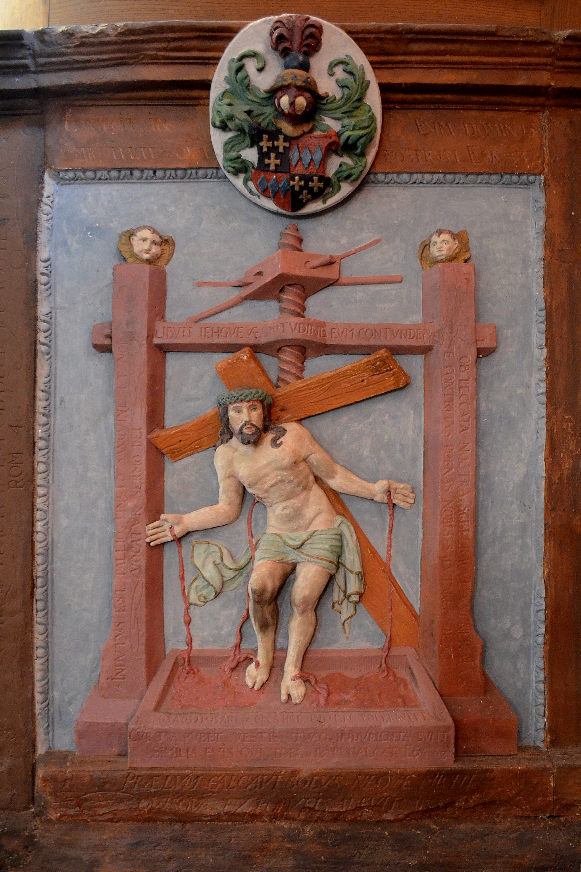 Ediger, Kreuzkapelle, Relief "Christus in der Kelter", mit Wappen der Stifterfamilie Schönenberg-Braunsberg